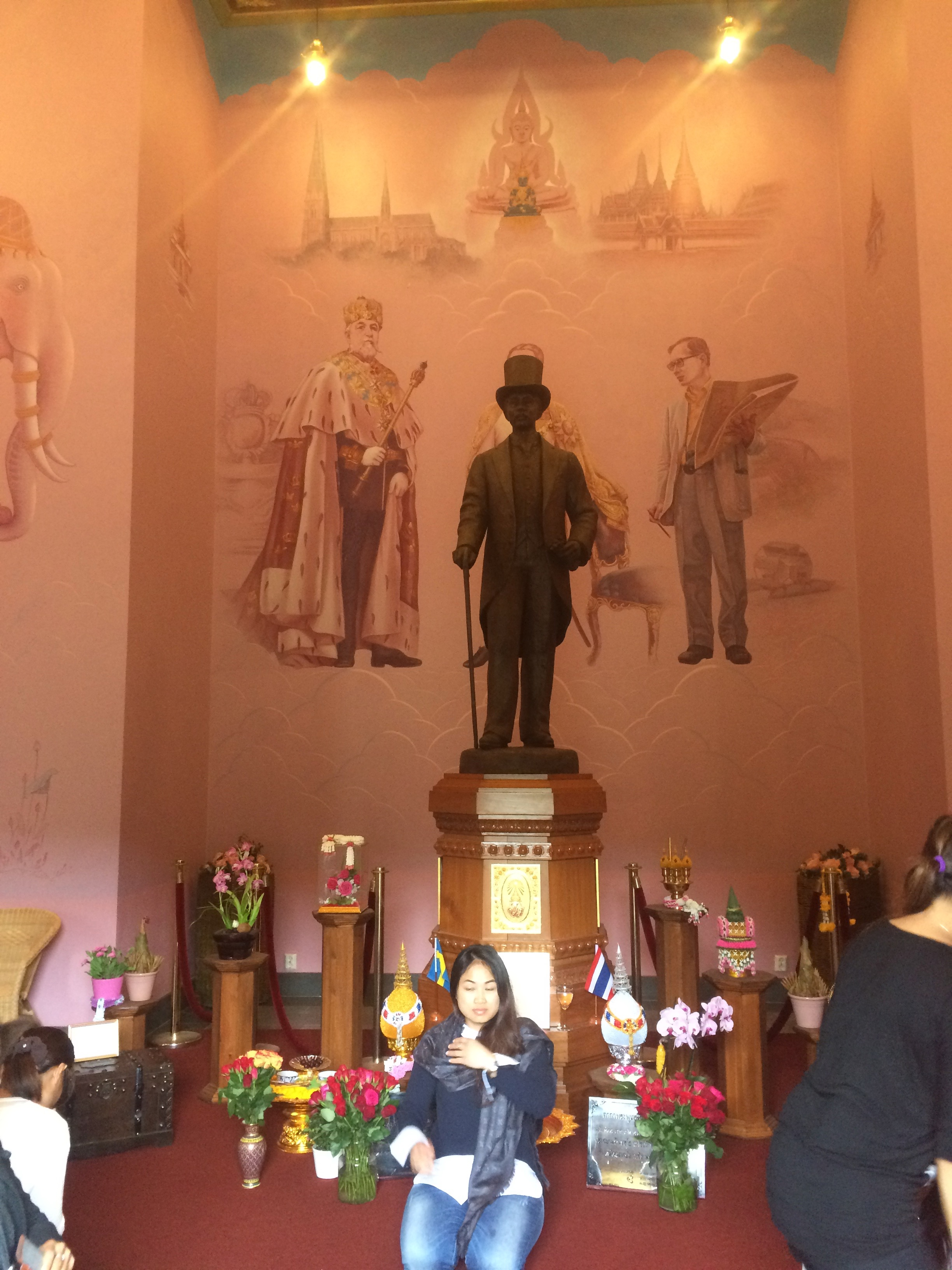 Statue av kong Chulalongkorn inne i Thailändska Paviljongen, Ragunda, Sverige. På veggen bl.a. bilde av kong Oscar II